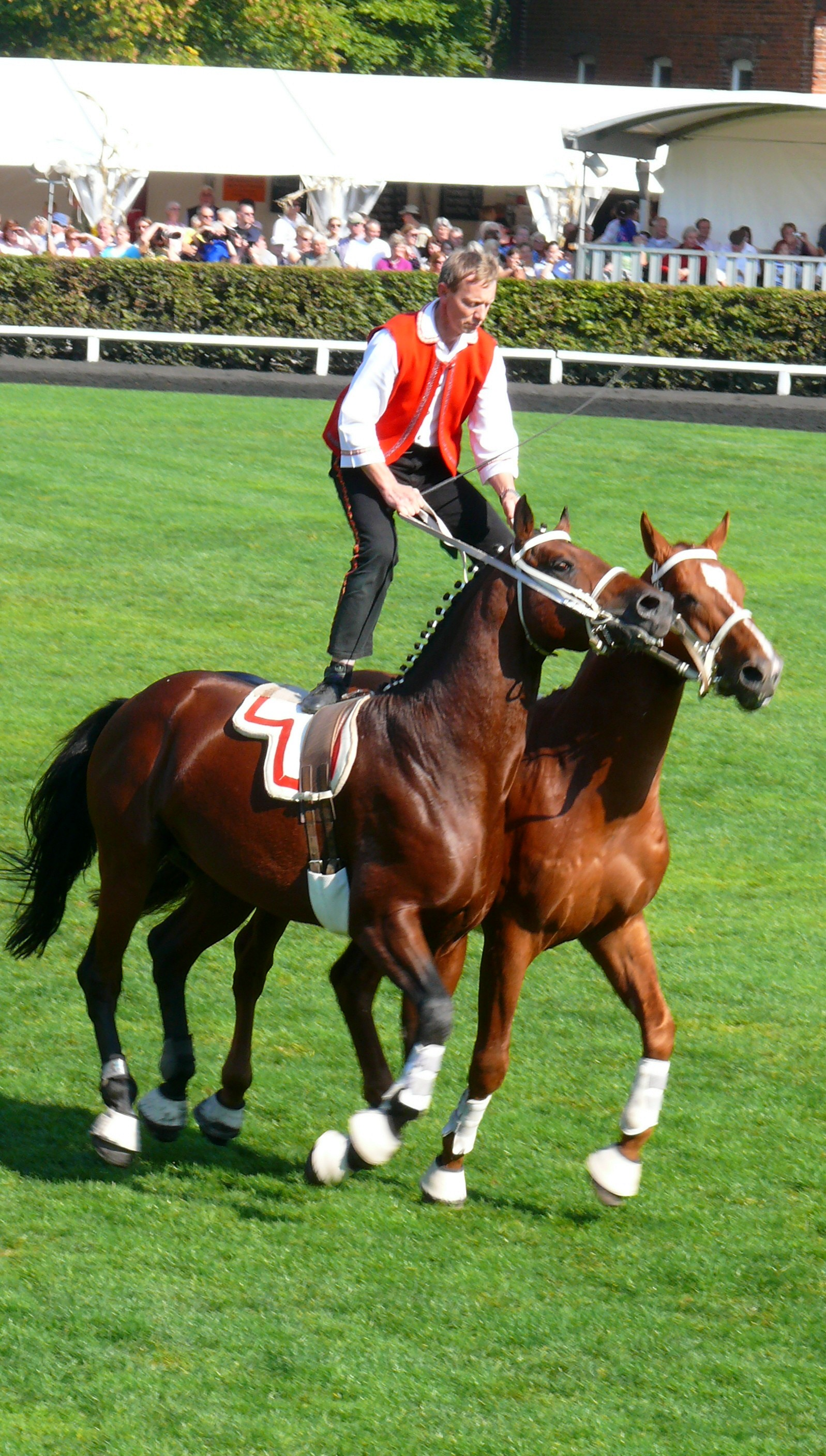 "Ungarische Post" bei der Hengstparade am 25.9.2011, ein Reiter steht auf zwei Pferden, die am Bauch und am Hals miteinander verbunden sind.